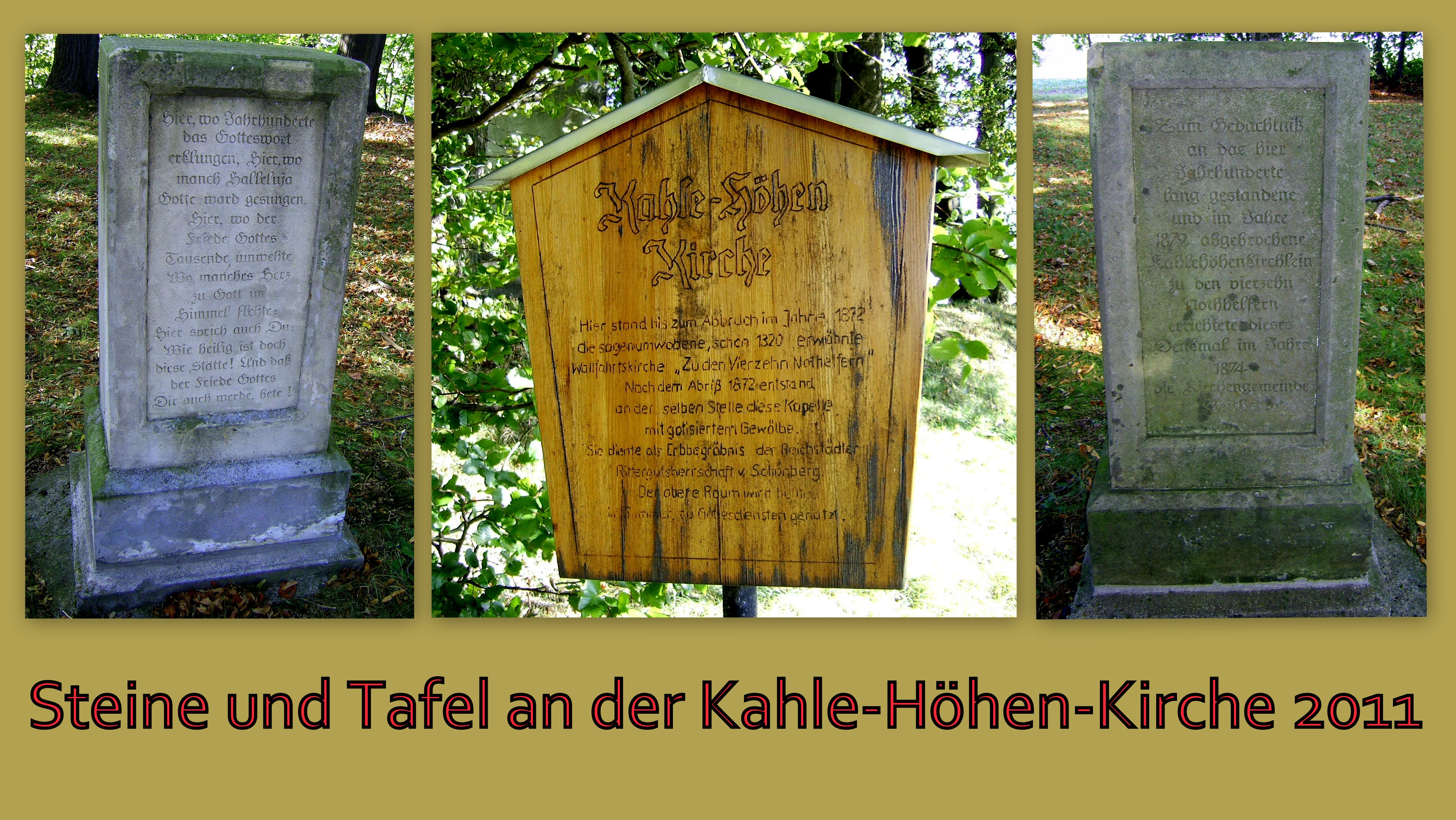 Gedenksteine und Tafel an der Kahlen-Höhe-Kirche in Reichstädt bei Dippoldiswalde zur Dokumentation der Texte.